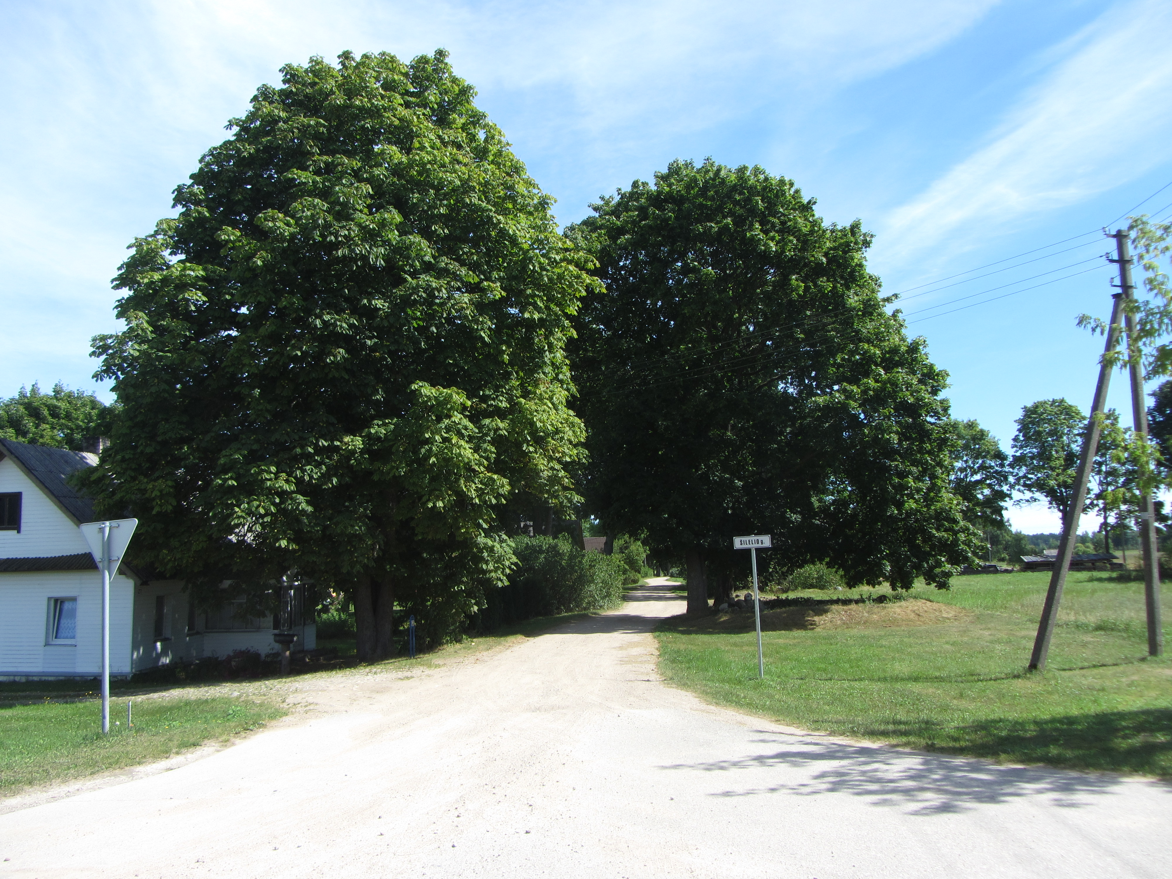 Kaimynai, Lithuania